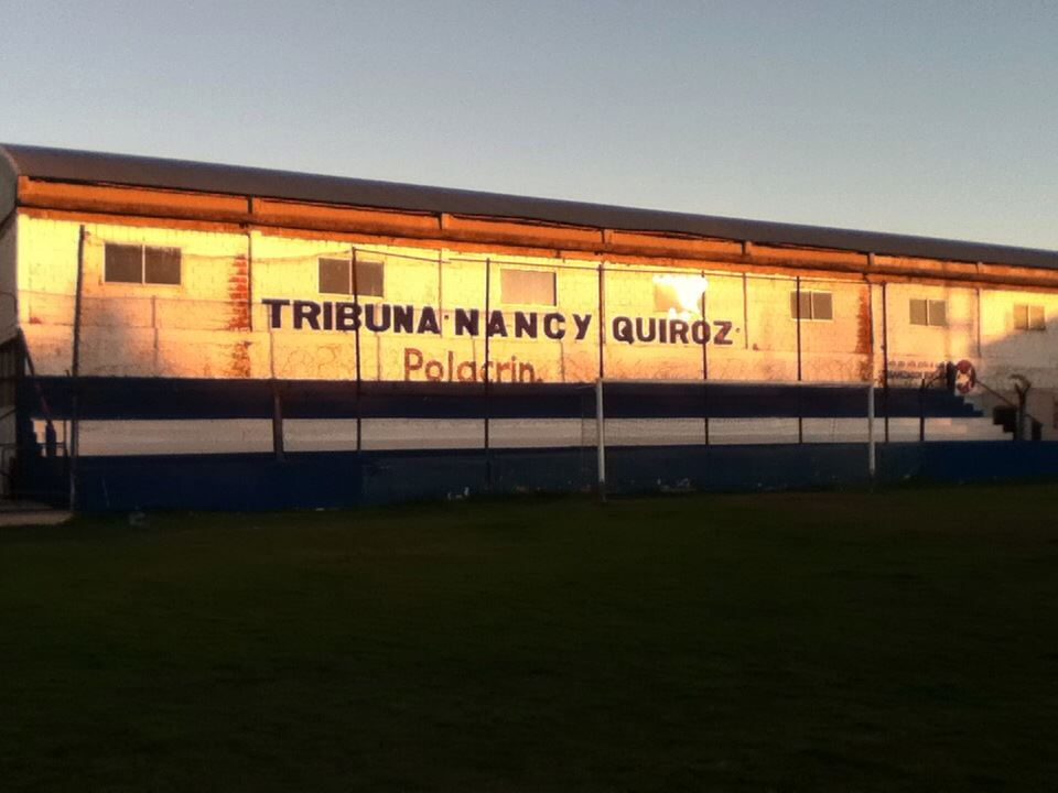 Tribuna social del Estadio Francisco Boga, de San Martin de Burzaco.